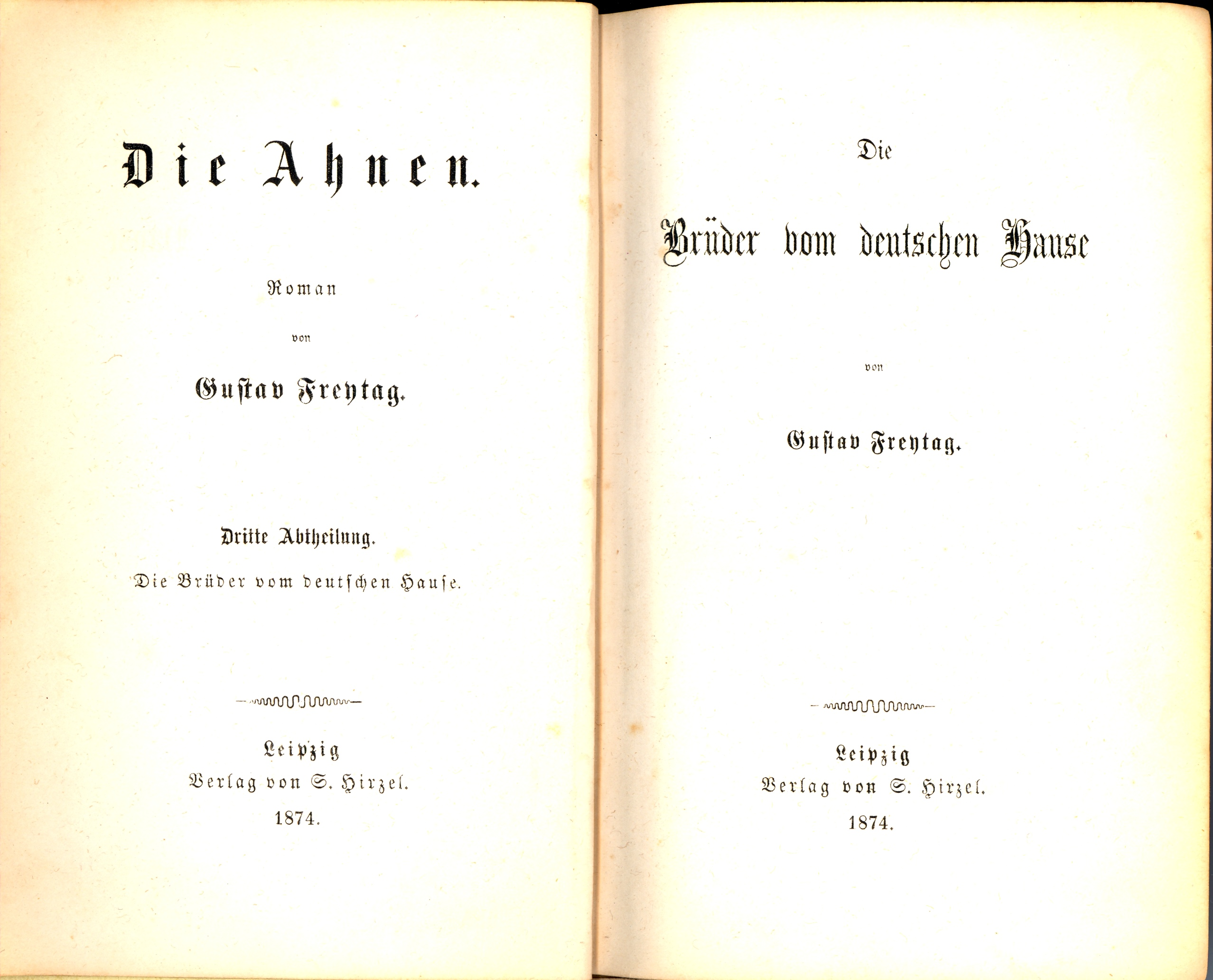 Gustav Freytag (1816-1895), Die Ahnen, Dritte Abtheilung: Die Brüder vom deutschen Hause, Leipzig 1874